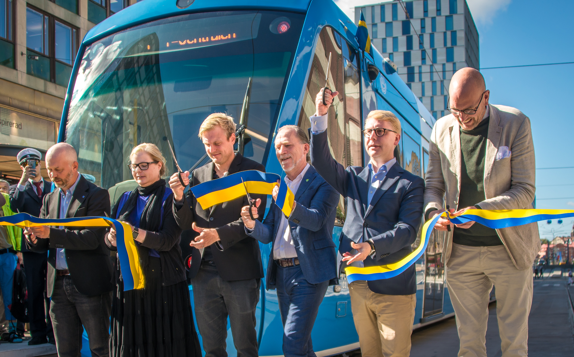 Karl Henriksson (KD), Sara Svanström (L) och Tomas Eriksson (MP), Daniel Helldén (MP), Kristoffer Tamsons (M) och Gustav Hemming (C) vid invigningen av Spårväg Citys nya hållplats vid Klarabergsgatan och därmed förlängning av linjen fram till T-centralen. Den nya hållplatsen T-Centralen blir ny start- och sluthållplats för Spårväg City mot Djurgården.